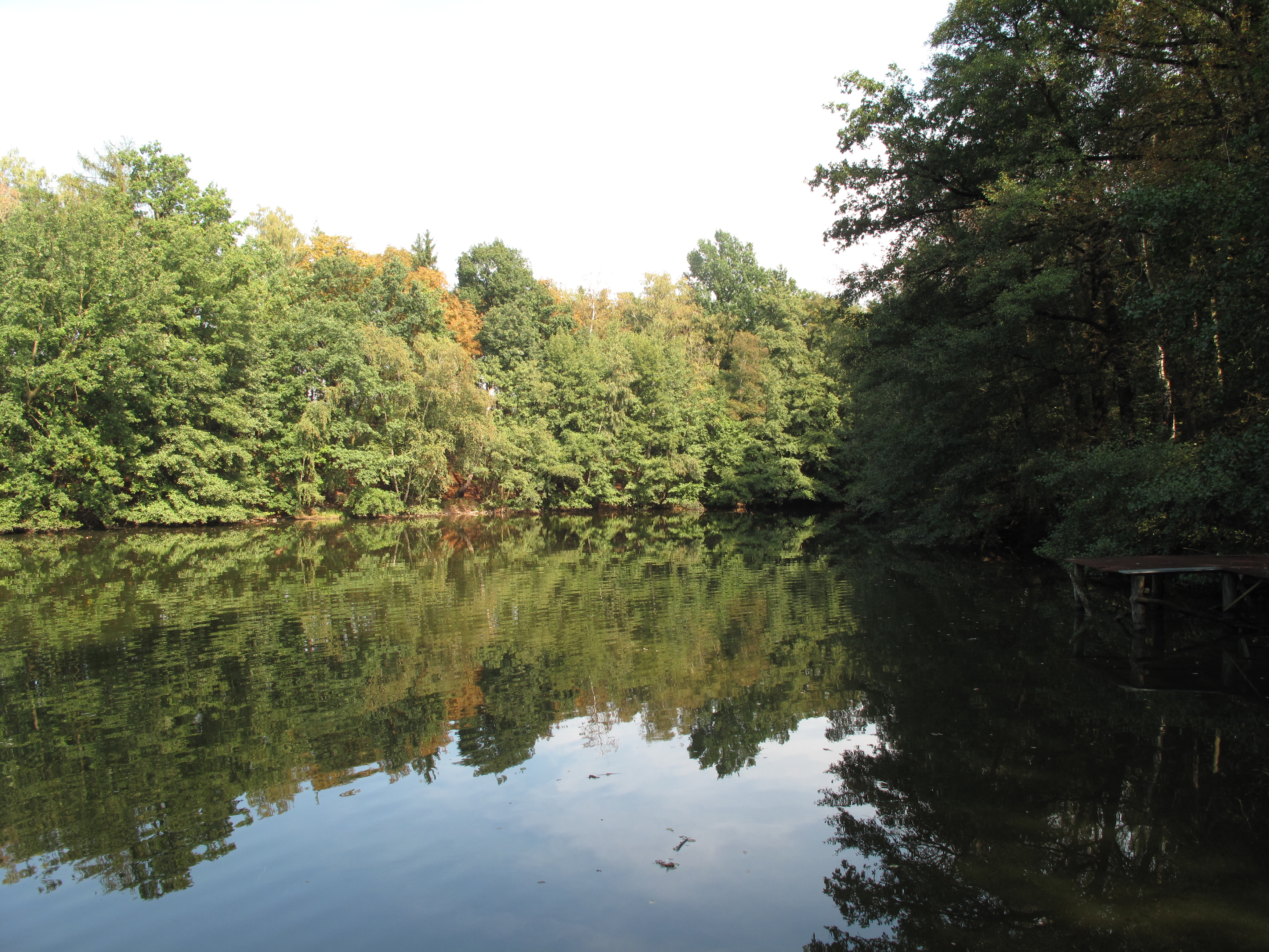 Obora. Praha, Česká republika.